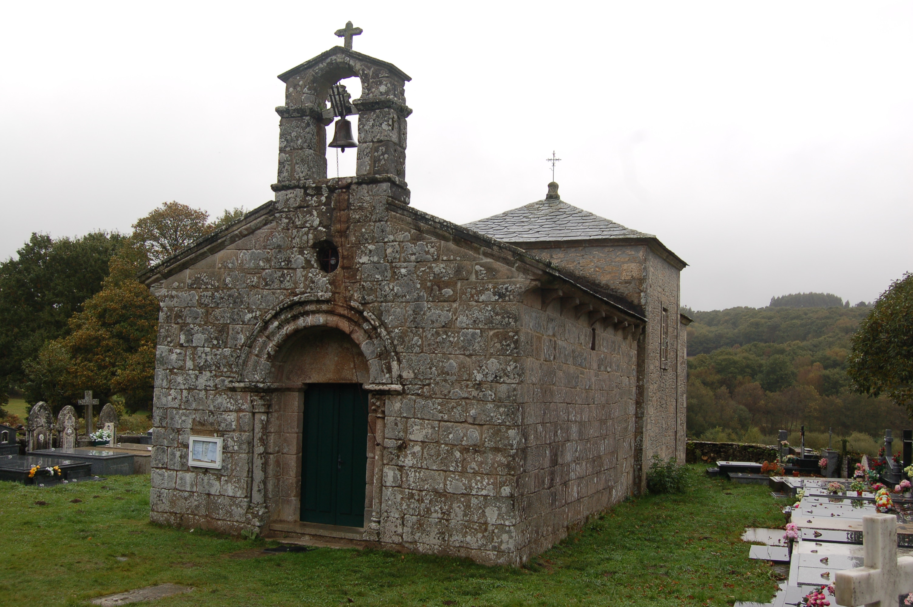 Vista xeral da igrexa parroquial de San Romao da Retorta (Guntín)